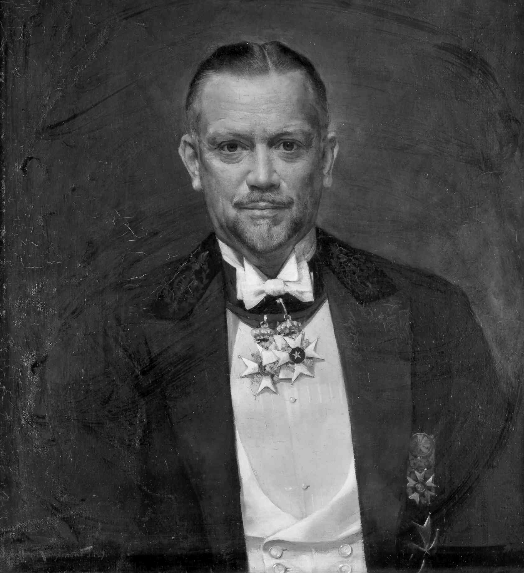 Carl Meurling